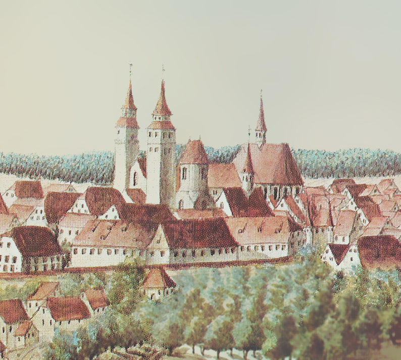 Markgröninger Heilig-Geist-Kirche und Bartholomäuskirche mit Dachreitern um 1800 (Ausschnitt aus Panorama)